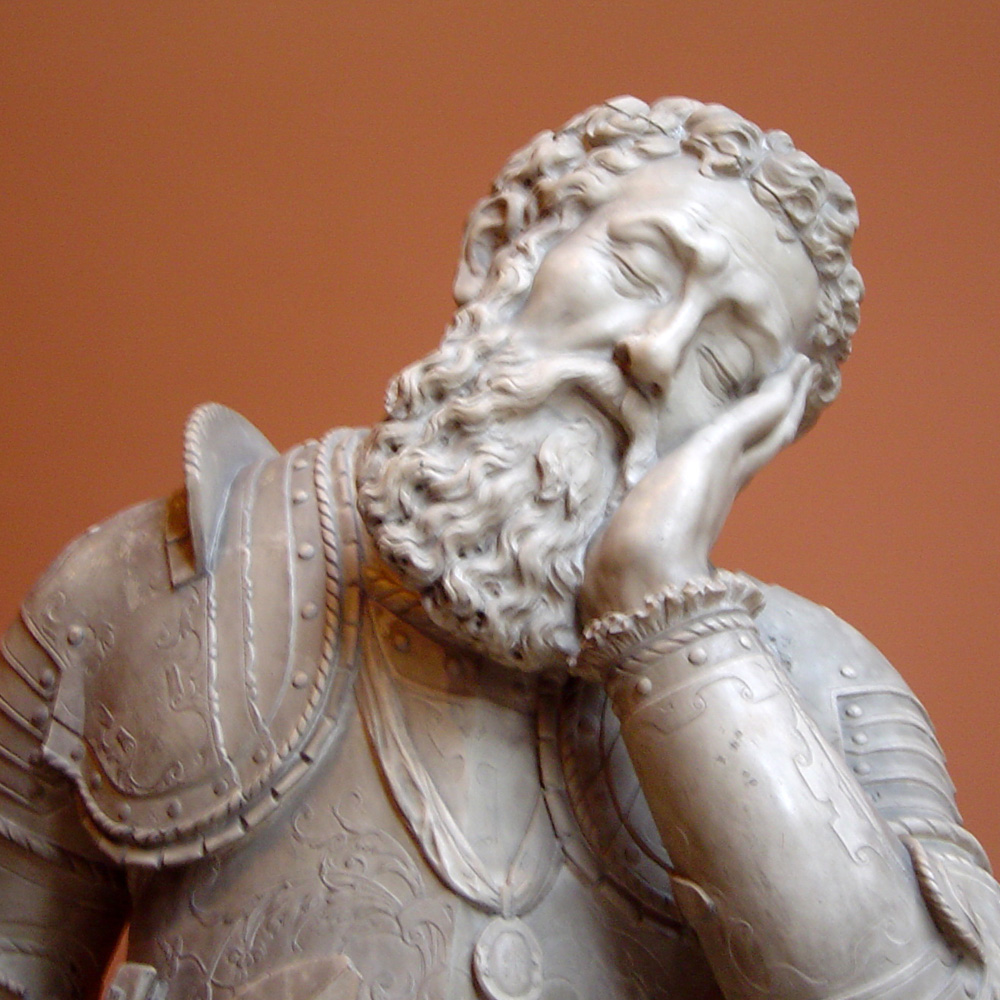 Par contrat du 24 juin 1557, Bontemps s'engagea envers la sœur du défunt, Martienne de Maigny, à exécuter le tombeau de ce capitaine des gardes de la Porte du Roi, représenté endormi dans sa fonction. detail